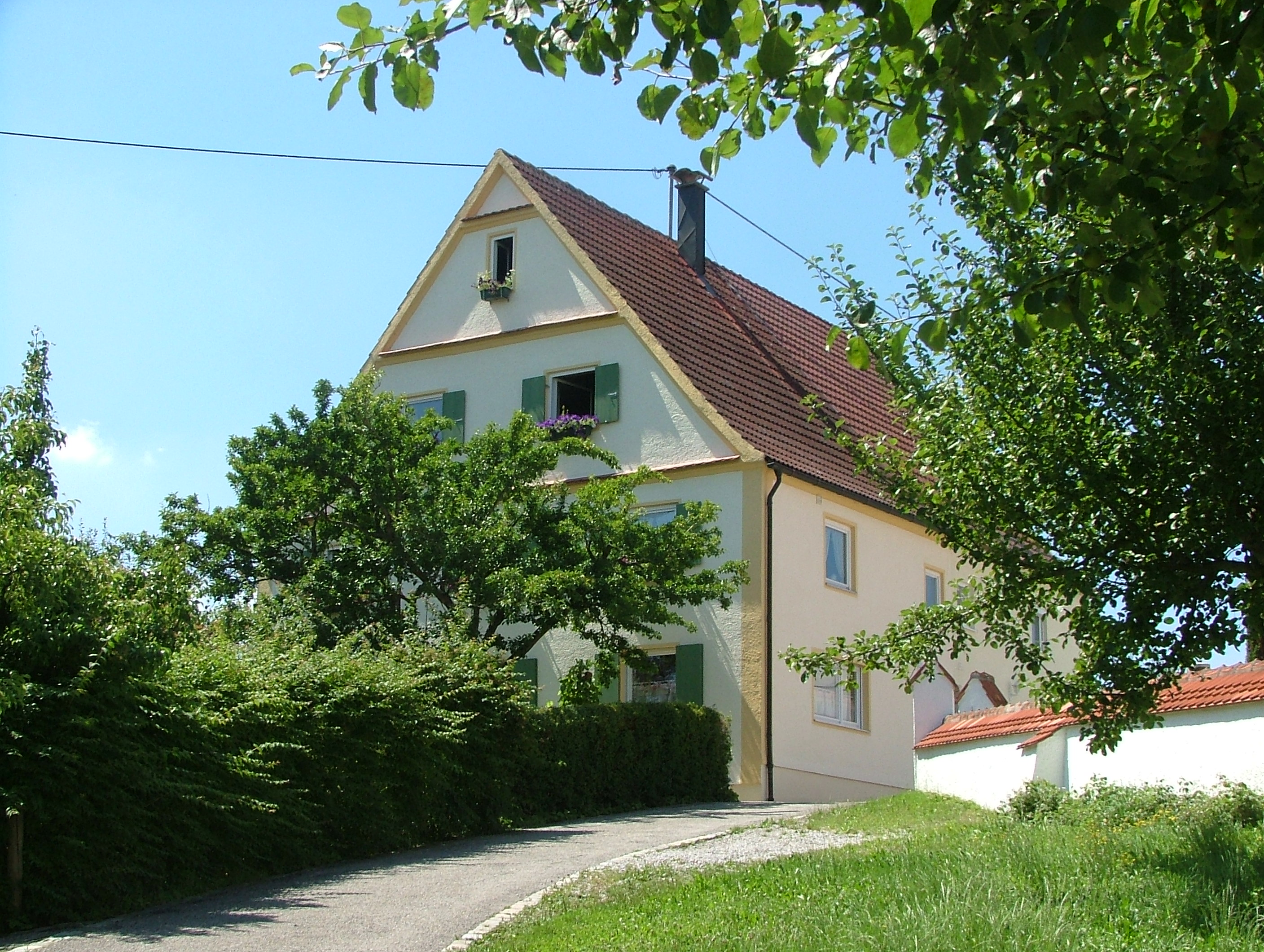 Attenhausen Pfarrhaus